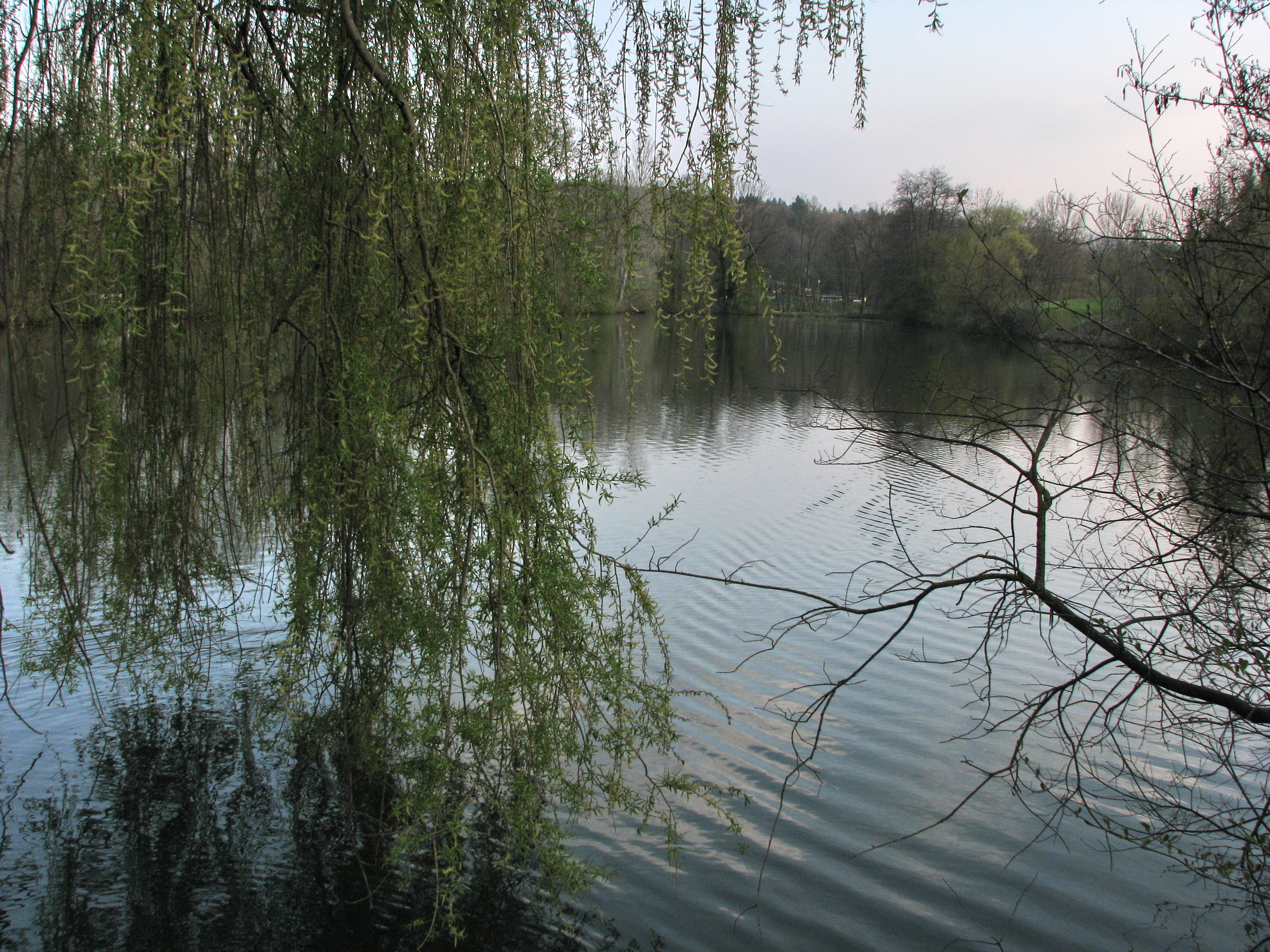 Marmoriweiher in Dietikon (Switzerland)